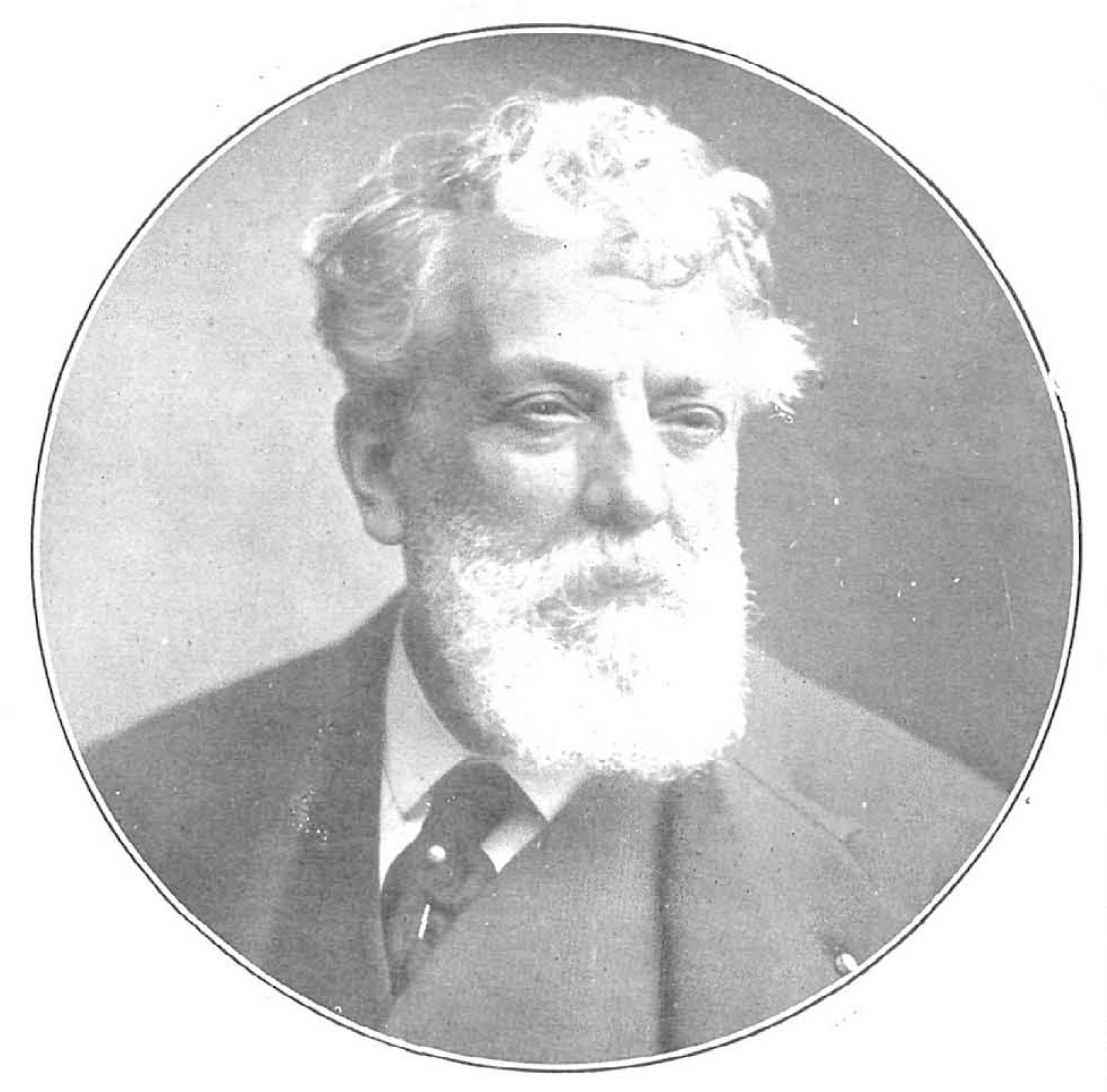 Francisco Domingo Marqués.